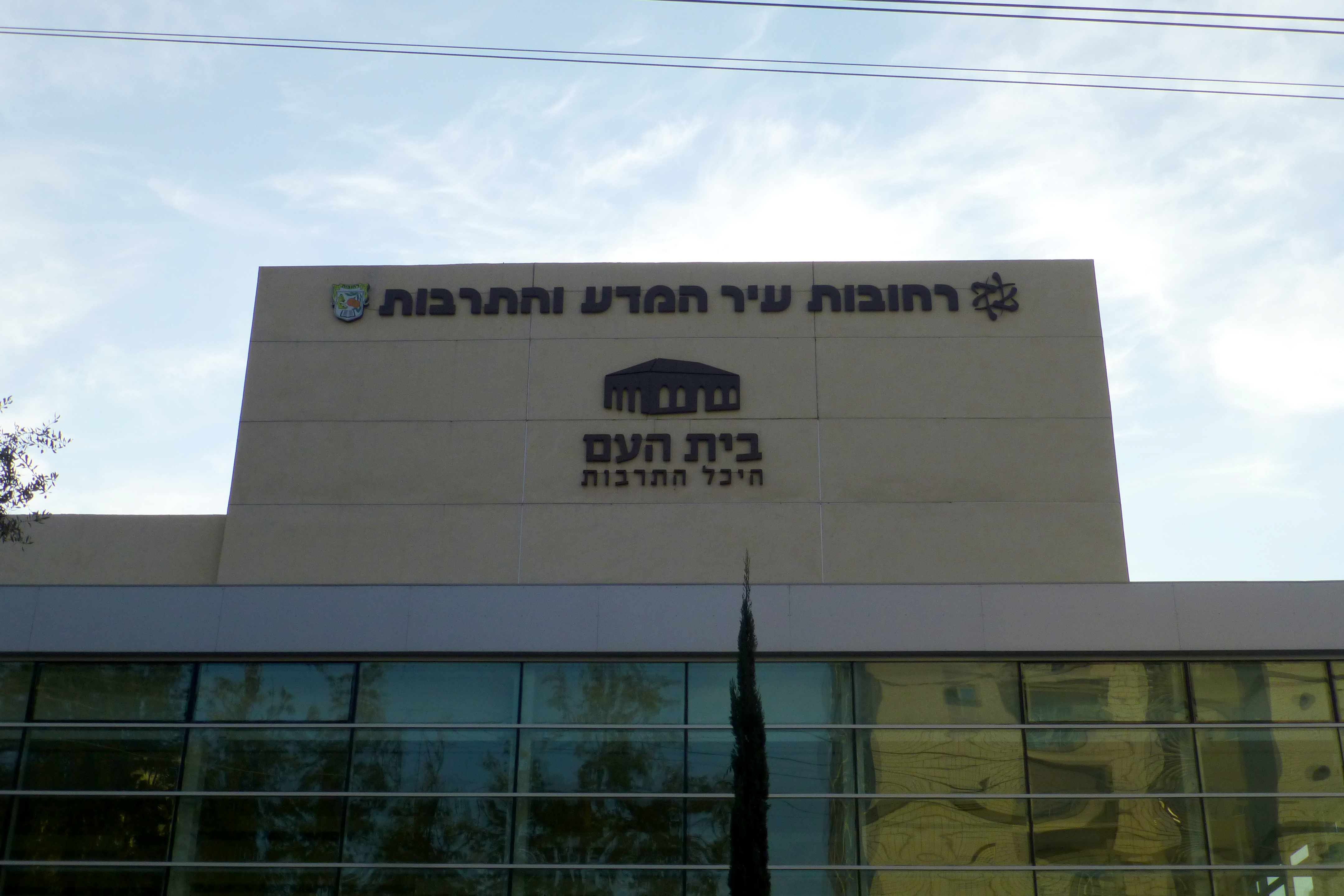 בית העם - שימש כמרכז החיים התרבותיים של המושבה בסגנון אקלקטי אופייני המזכיר טירה עתיקה ומשלב אלמנטים מחומת ירושלים.